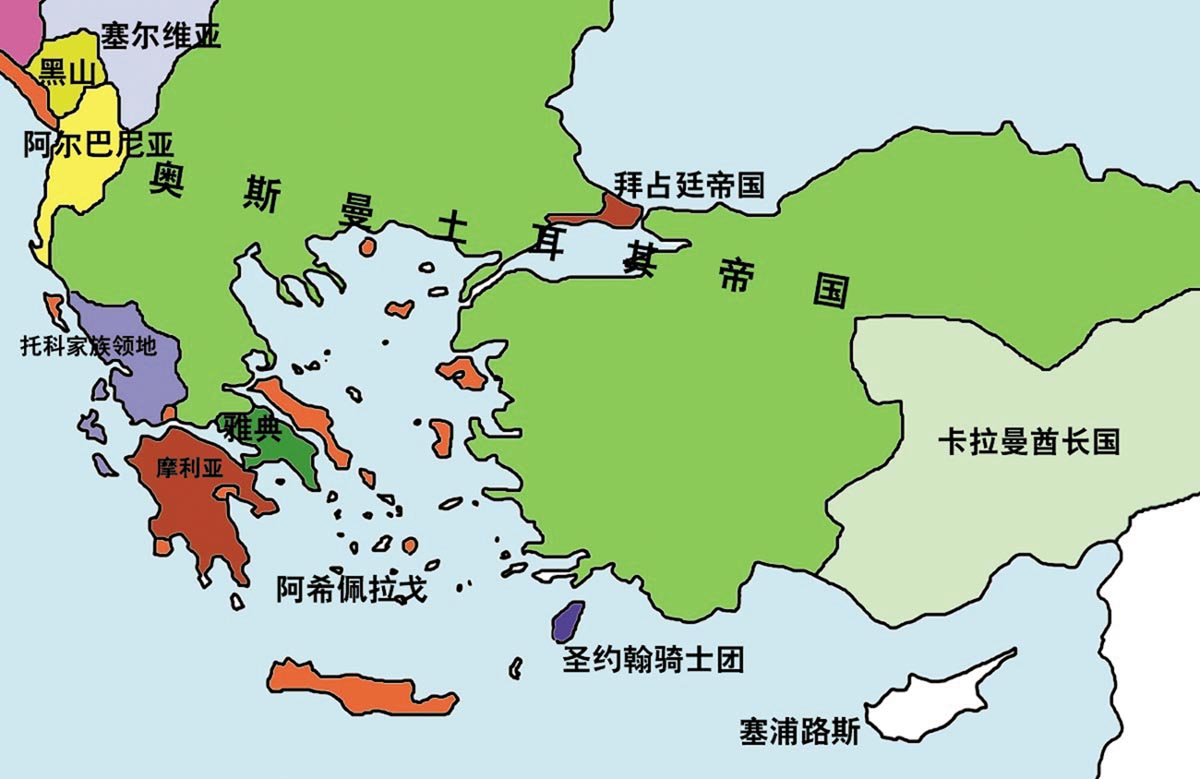 灭亡前夕的zh:拜占庭帝国疆域，公元1440年前后